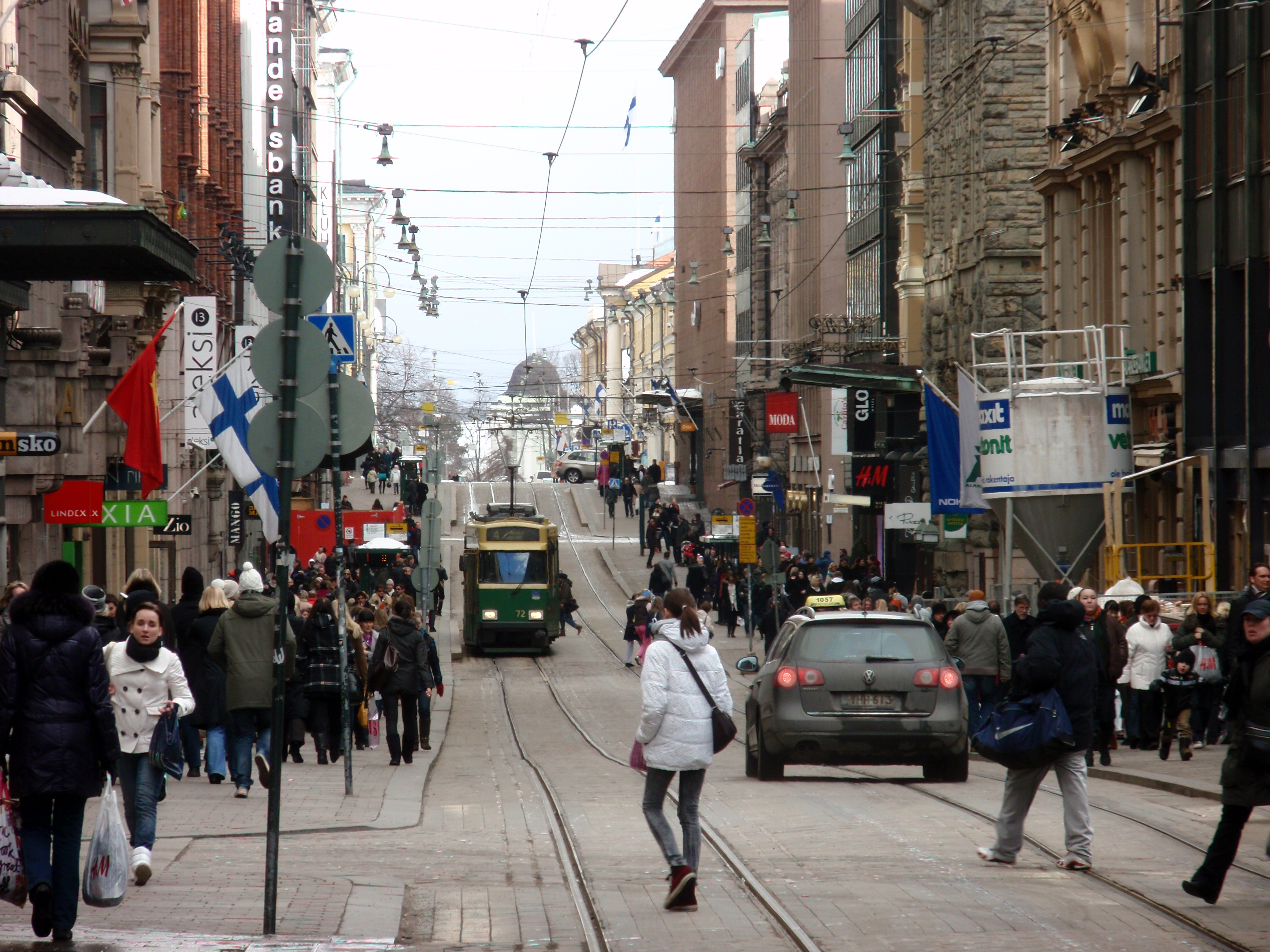 Aleksanterinkatu